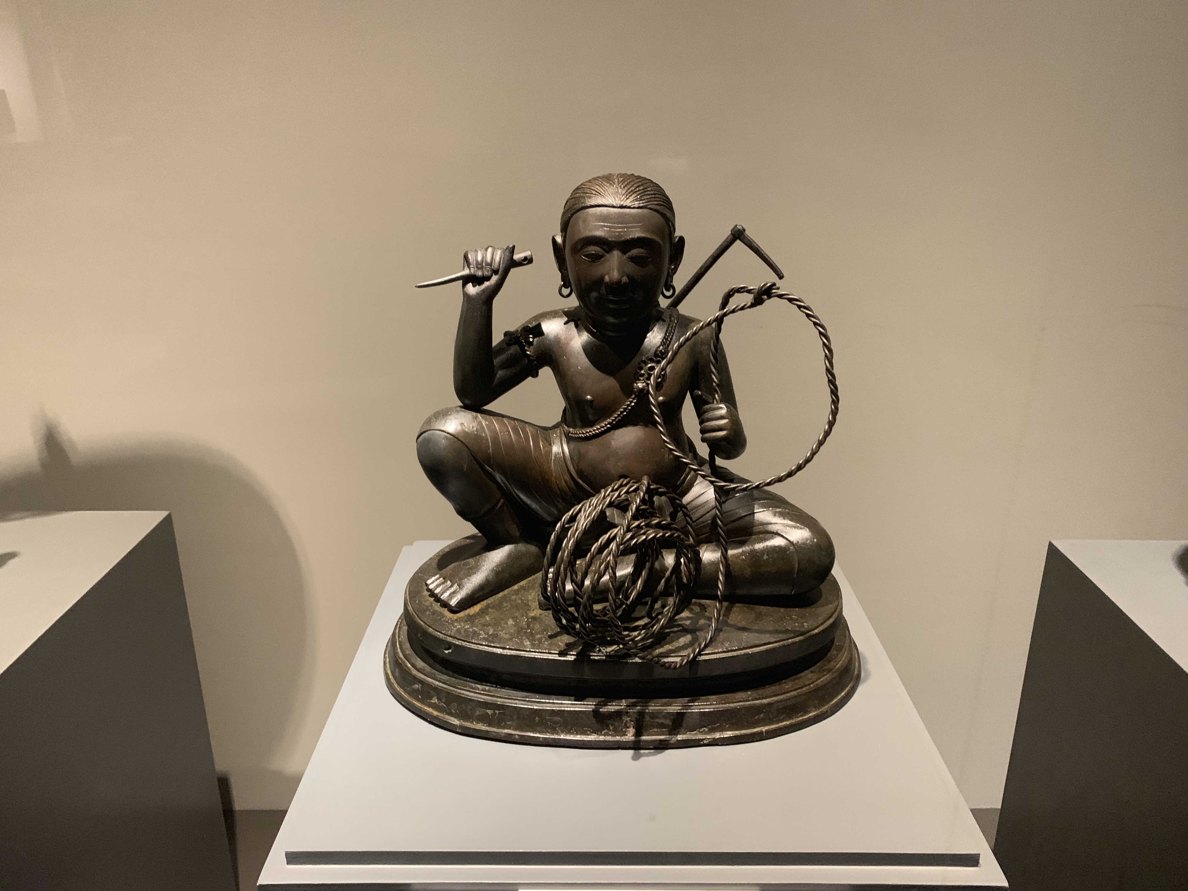 พระครูปะกำ พระครูปะกำช้าง ศิลปะรัตนโกสินทร์ จัดแสดงที่พิพิธภัณฑสถานแห่งชาติ พระนคร